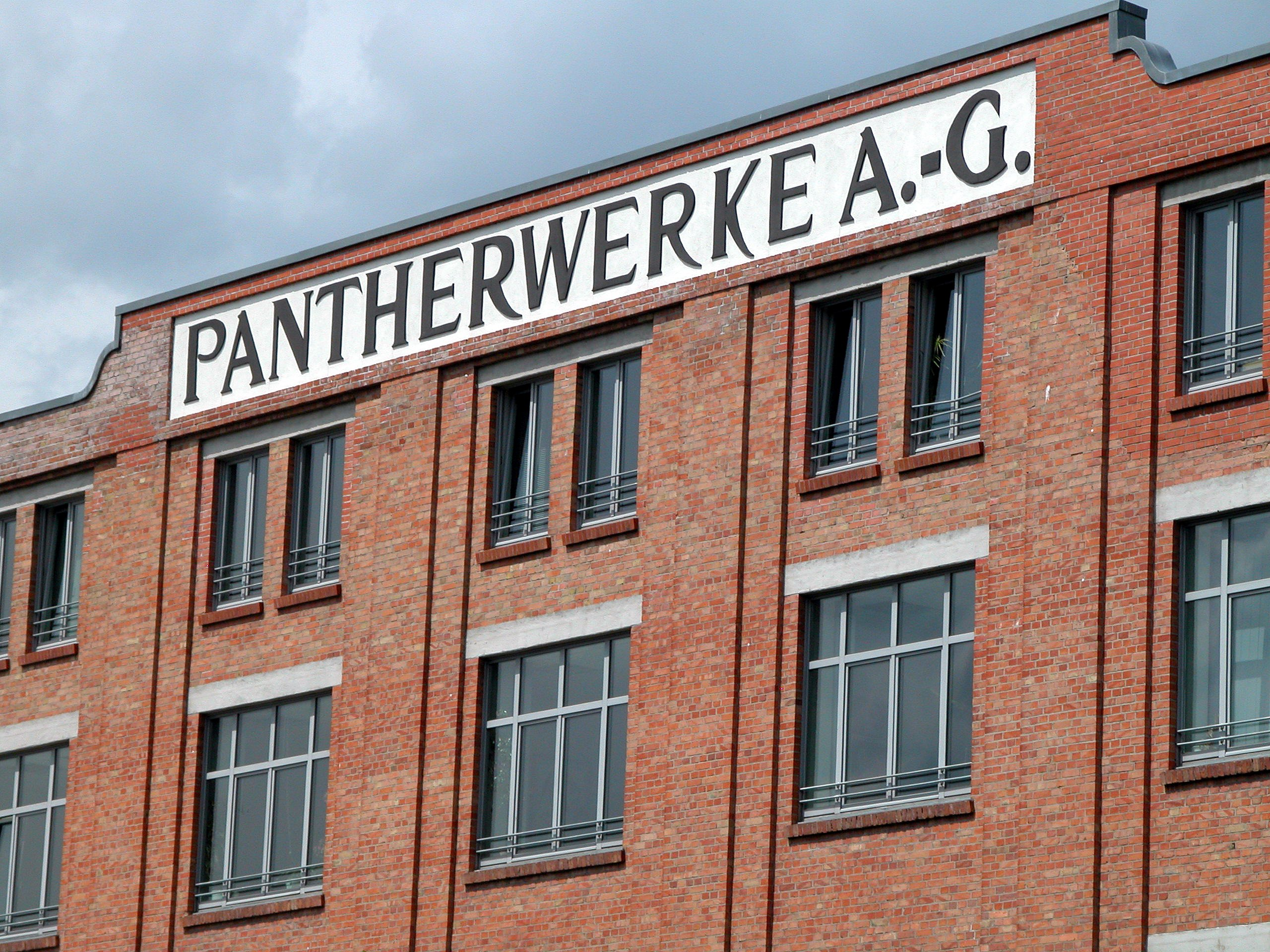 Braunschweig: Schriftzug der Pantherwerke AG. Braunschweig, Germany: Company name Panther Works (Pantherwerke).